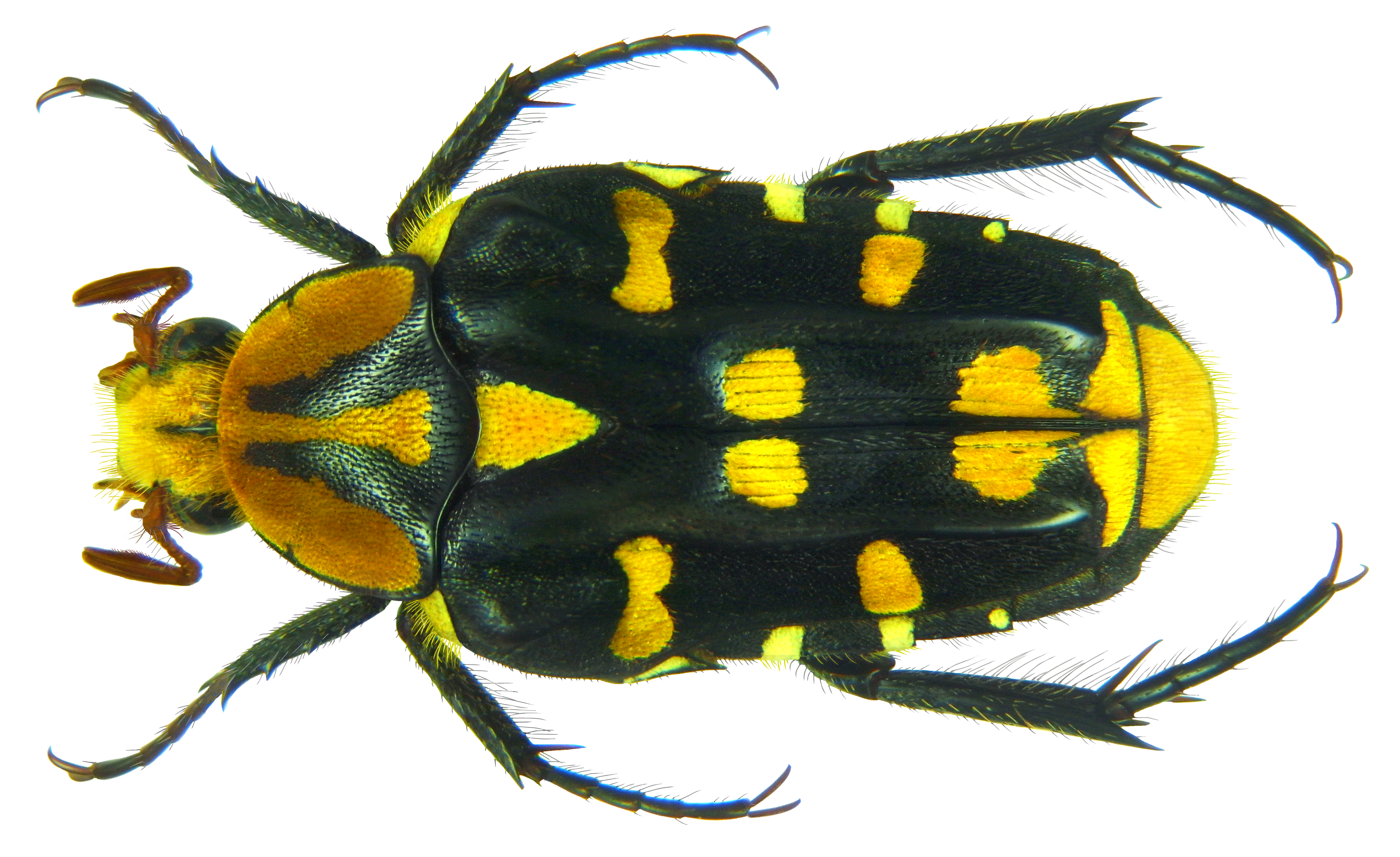 Familie: Scarabaeidae Groesse: 15,6 mm (13,2-16,5 mm) Verbreitung: Sulawesi Fundort: Indonesien, Sulawesi, Palu, leg. local collectors, 4.IX.2002; det. U.Schmidt, 2013 Photo: U.Schmidt, 2013